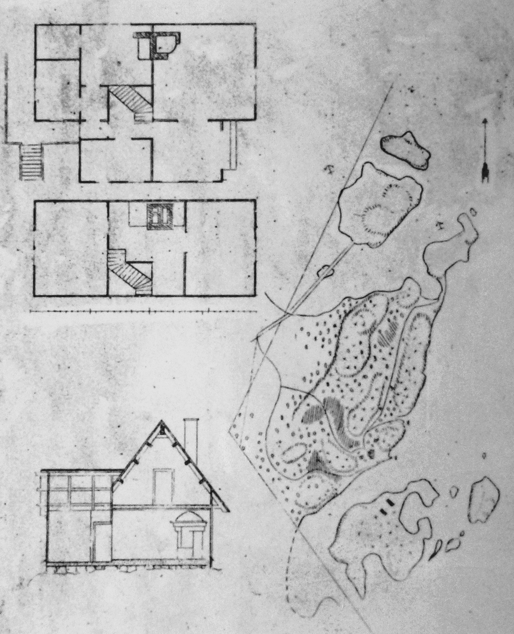 Ritning till Villa Torsvi